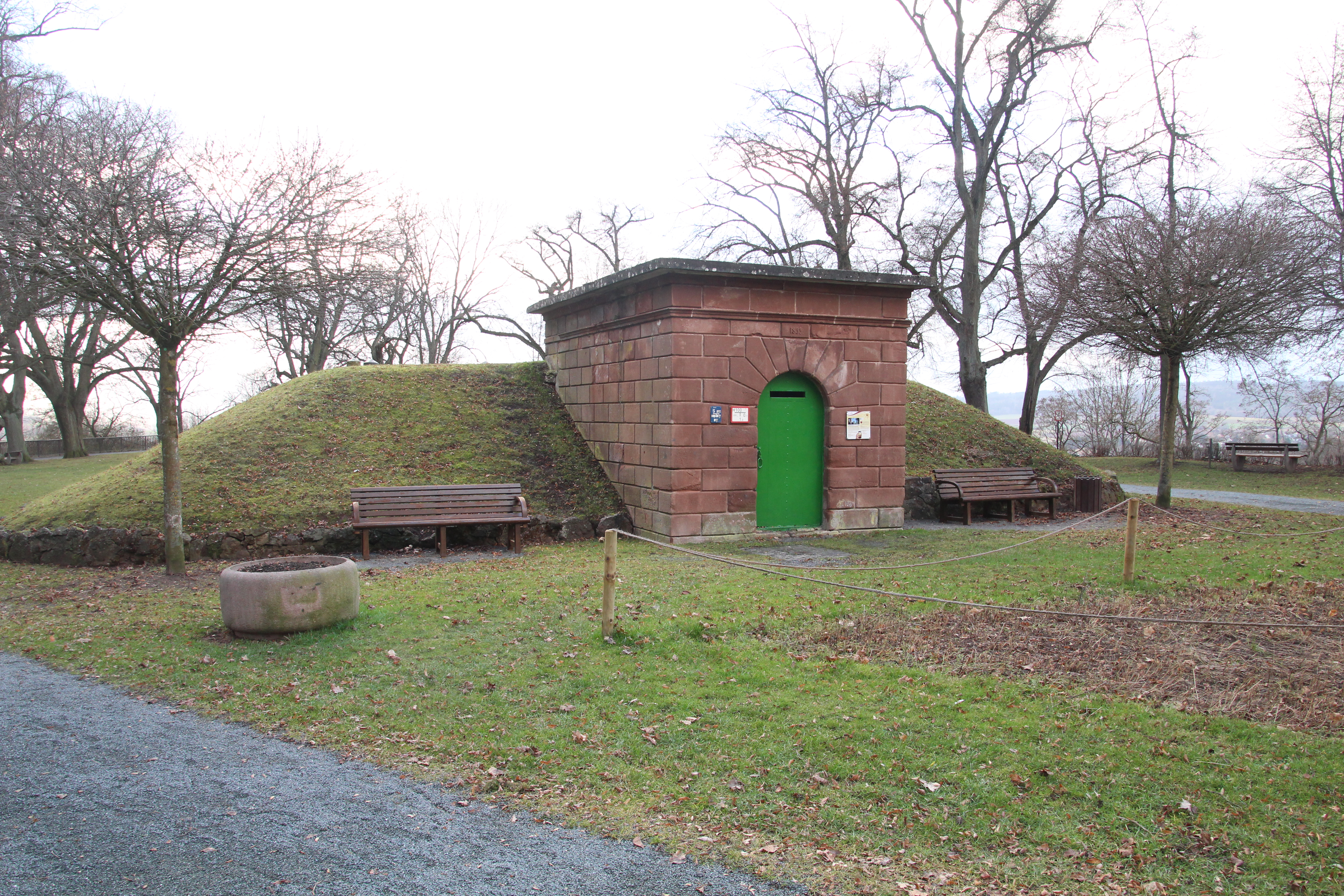 Siehe Bild und Dateiname